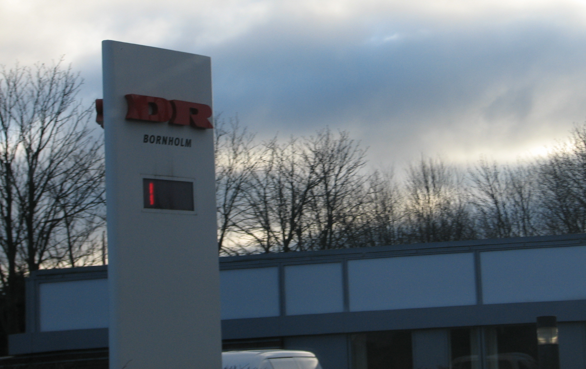 Danmarks Radio - afdeling Bornholm